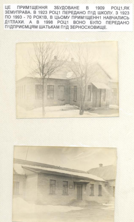 Перша школа в с. Олександропіль